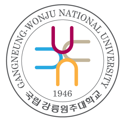 도형과 색채와 문자의 결합 상표로써, 강릉원주대학교의 UI로 사용되고 있다.